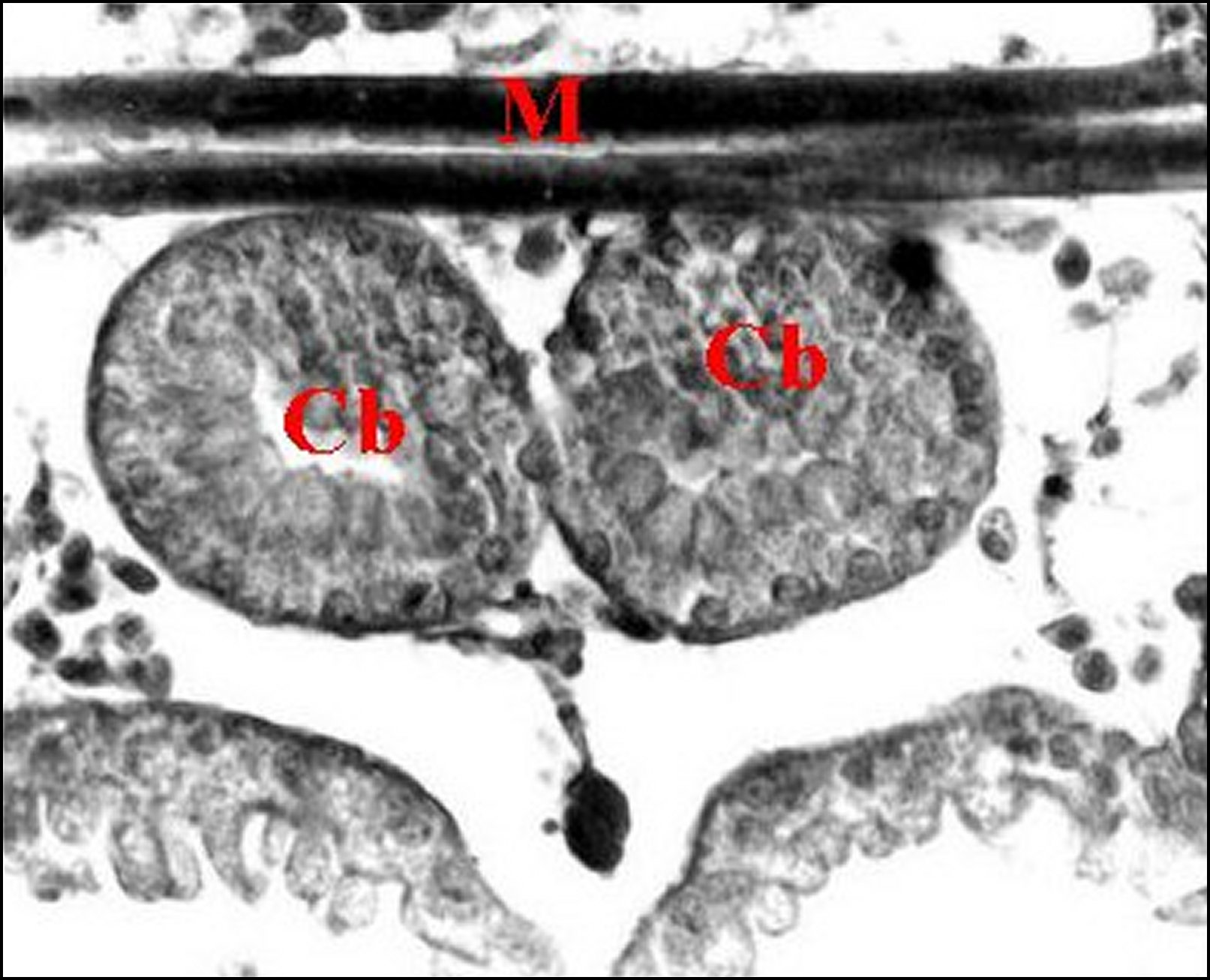 Rostre de Diguetia canities renfermant la glande rostrale apparaissant double en coupe histologique transversale.